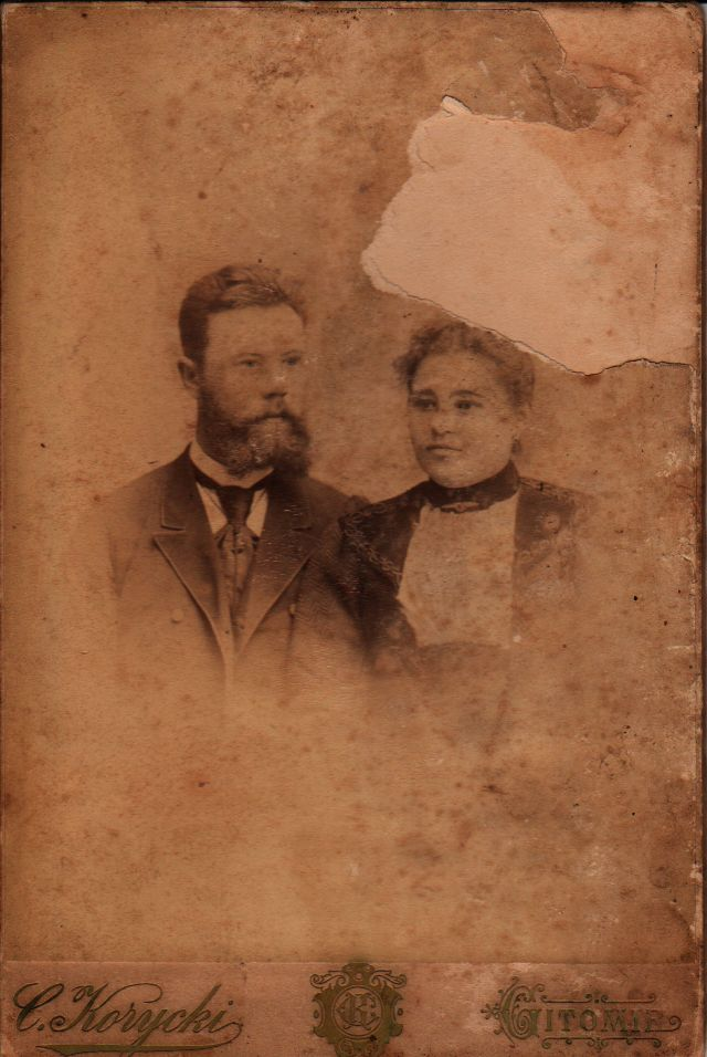 Владимир Иосифович Левковский и жена Прасковья в день свадьбы, 1900 г.